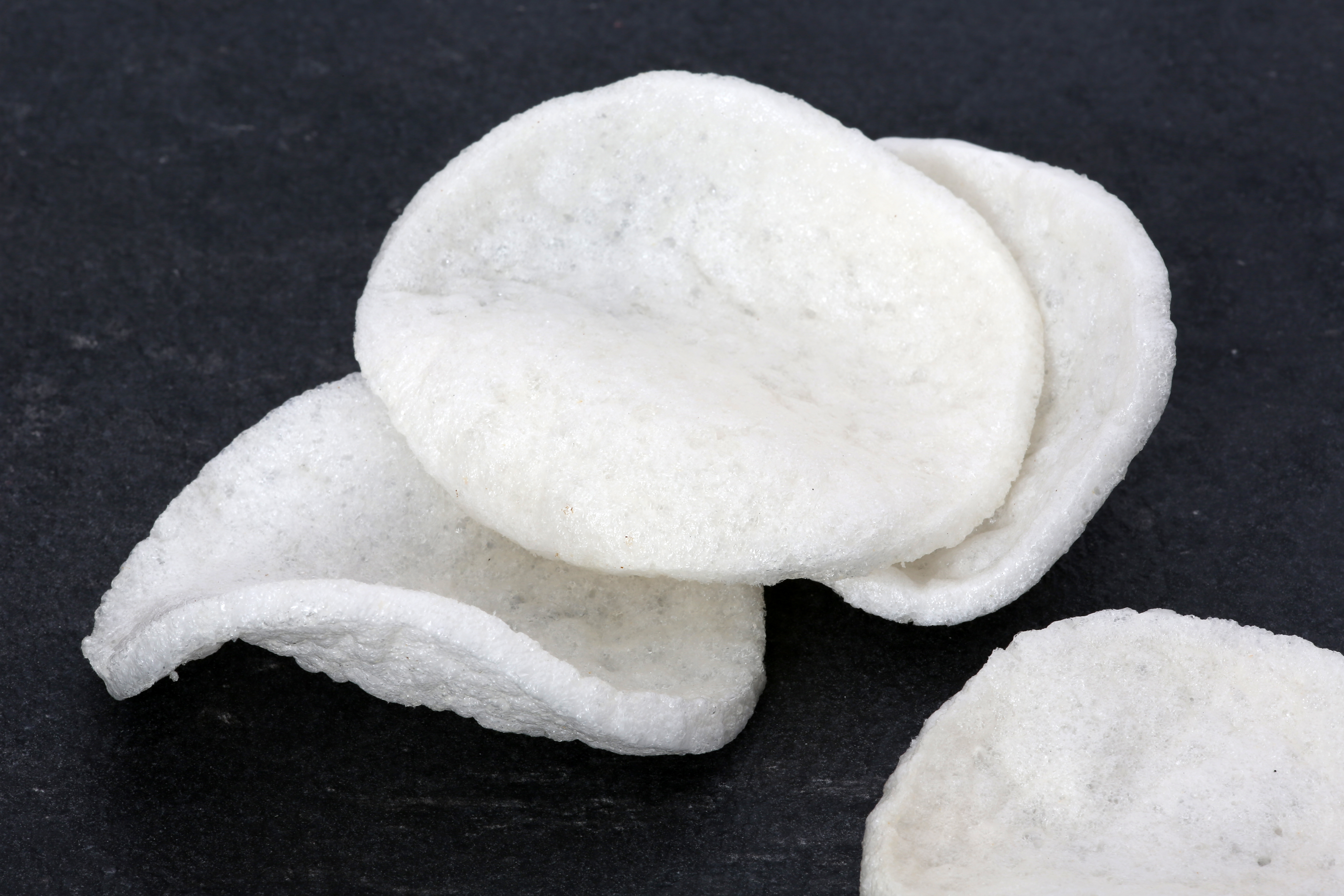 Krabbenchips